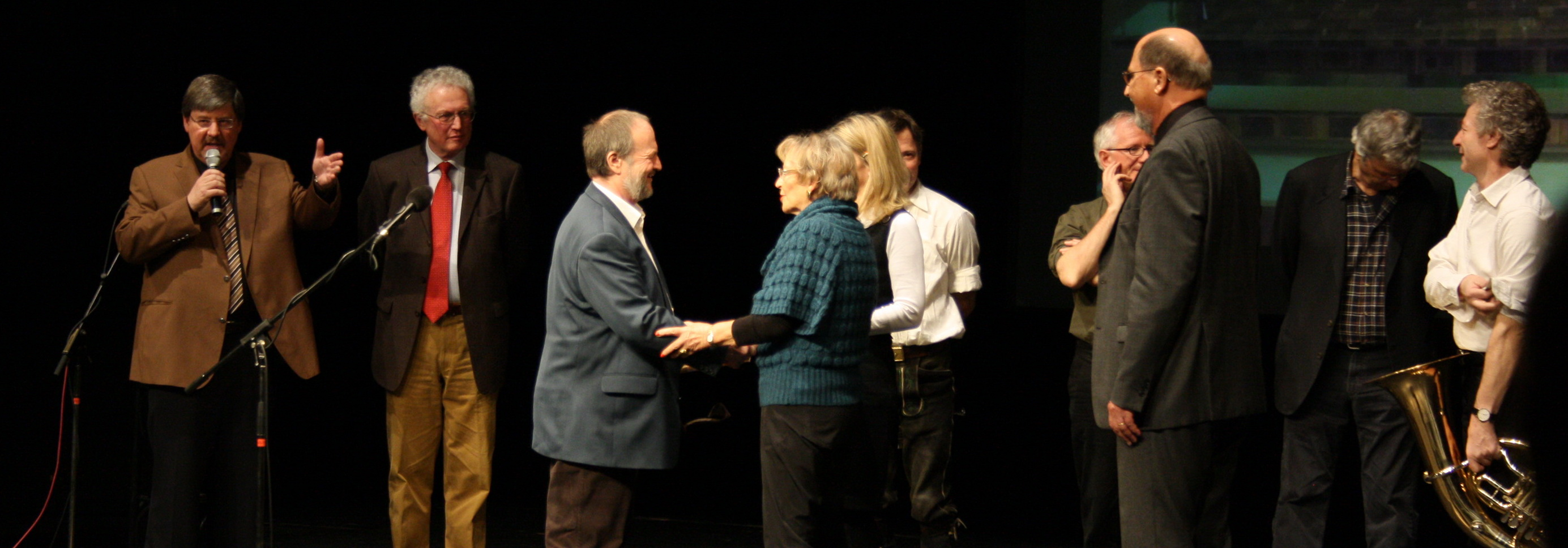 Fredl Fesl erhält den Großen Karl Valentin Preis im Münchner Volkstheater. Er wird von der Enkelin und der Großenkelin von Karl Valentin beglückwünscht. Auf der Bühne die Preisträger von 2007, die Biermösl Blosen und Gerhard Polt.